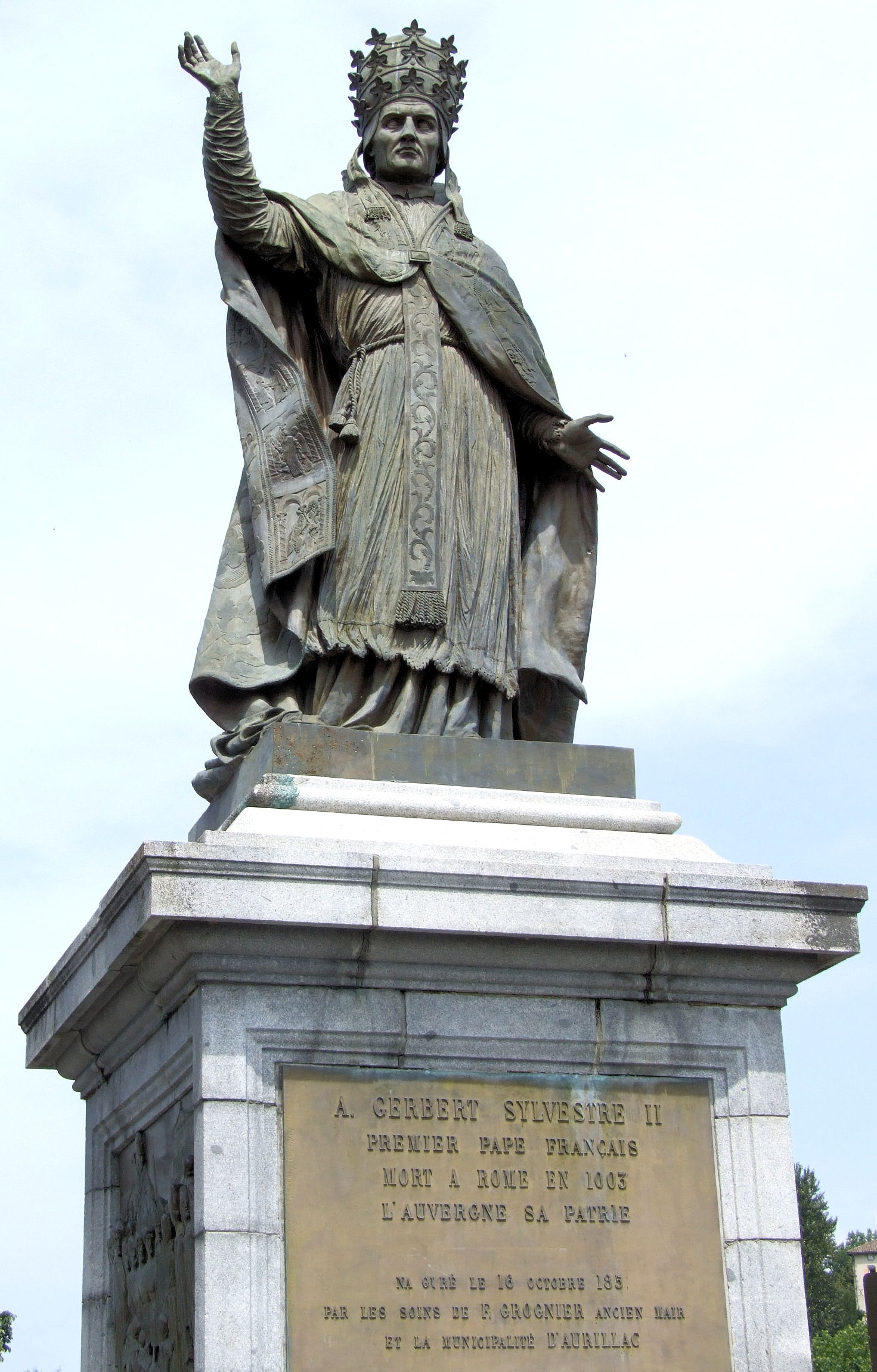 Aurillac - Monument au pape Gerbert, par Pierre-Jean David d'Angers.